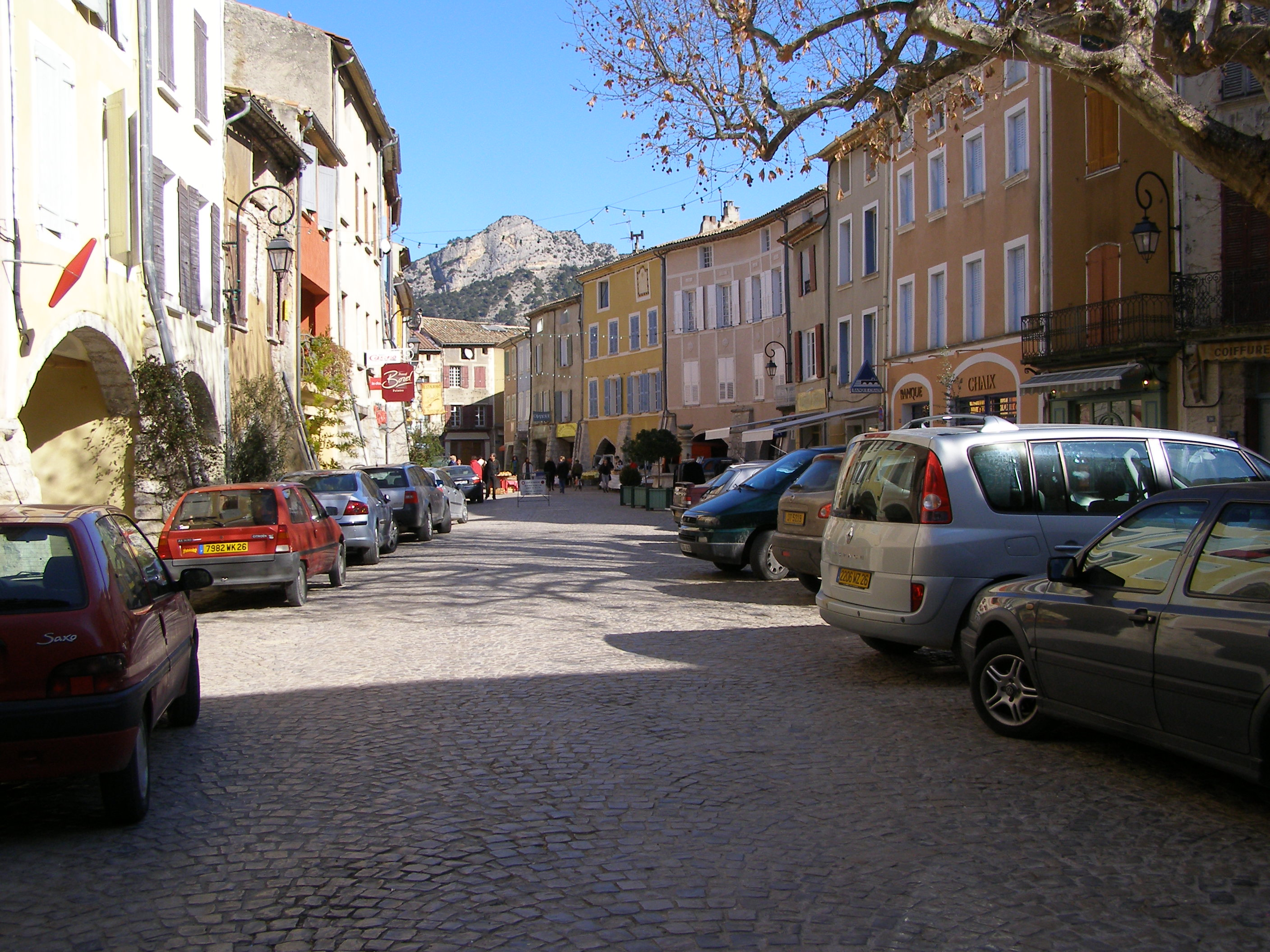 Buis-les-Baronnies (Drôme, France). Place des Arcades ou du Marché, dans le vieux bourg. À l’arrière-plan au centre, le rocher d’Ubrieux.